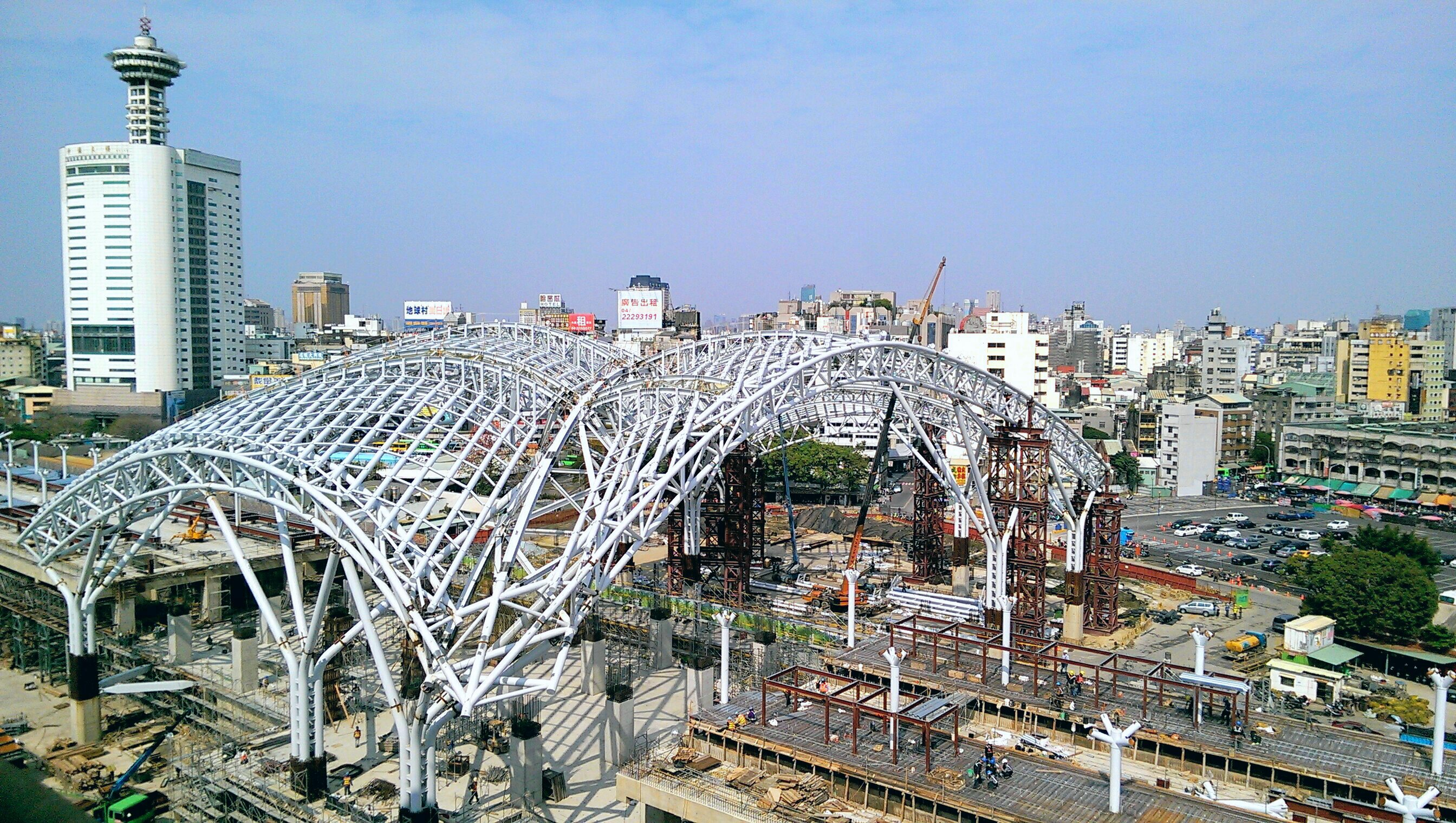 中文（台灣）: 台中鐵路高架化2015年3月台中車站周邊工程